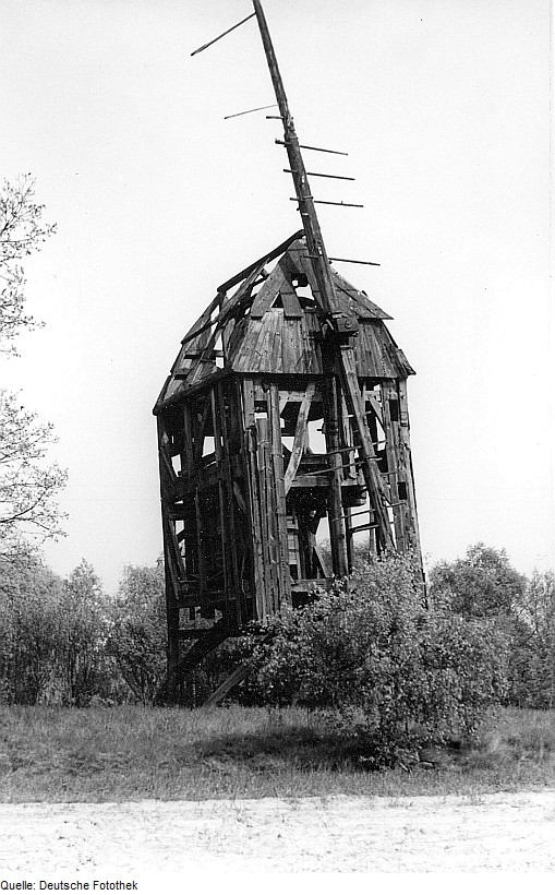 Original image description from the Deutsche FotothekStendal-Bindfelde. Bockmühle, ruinös